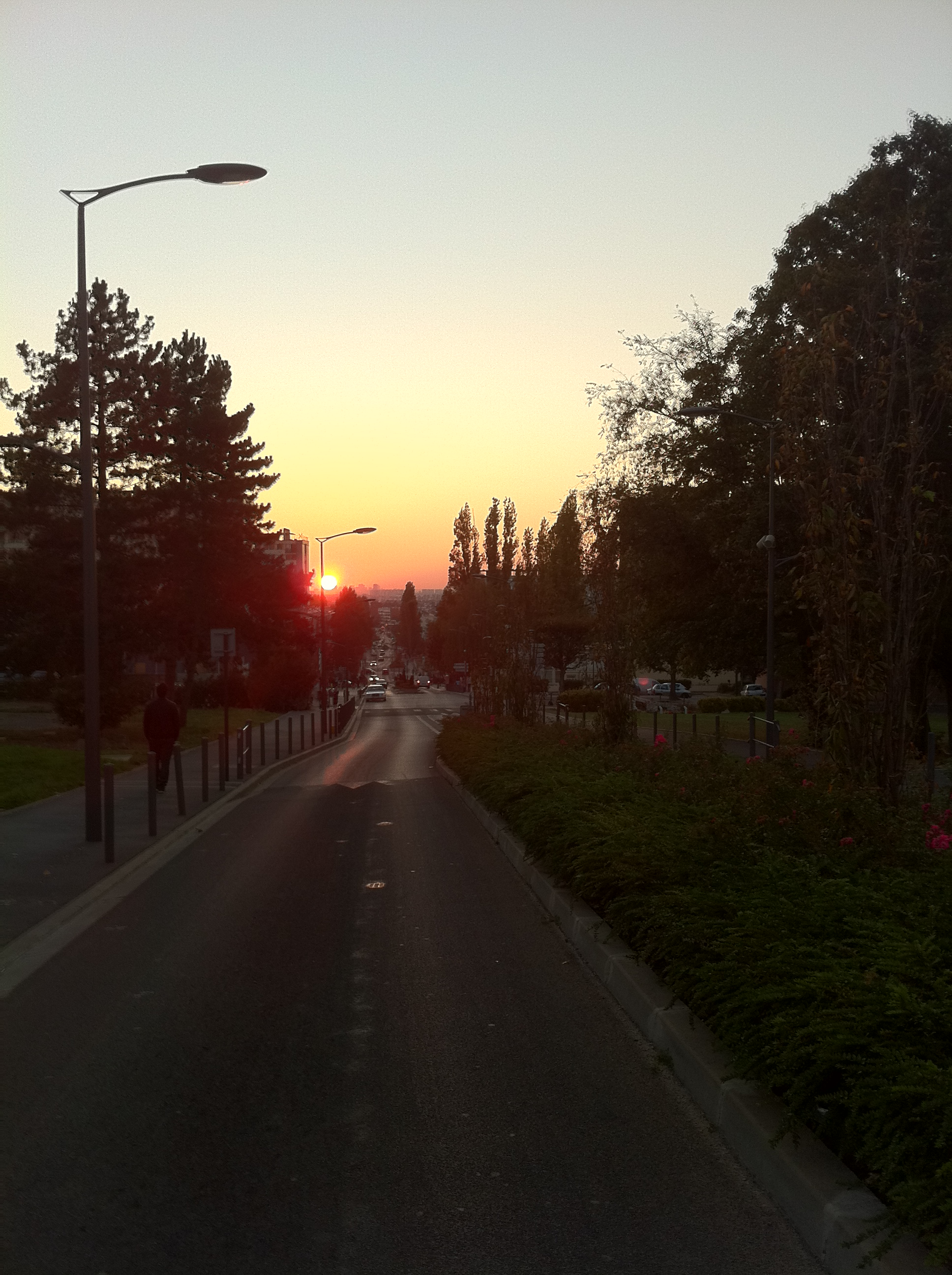 Prise le 03 octobre 2011.